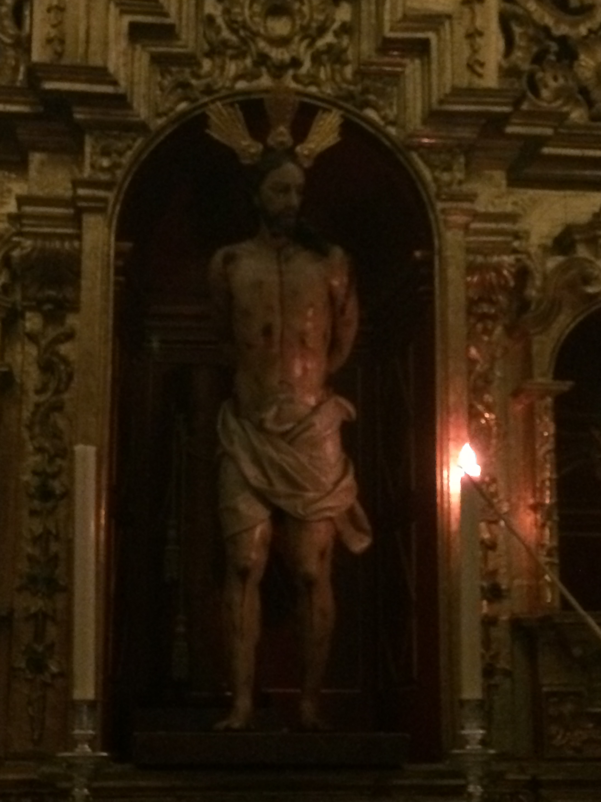 Flagelacion